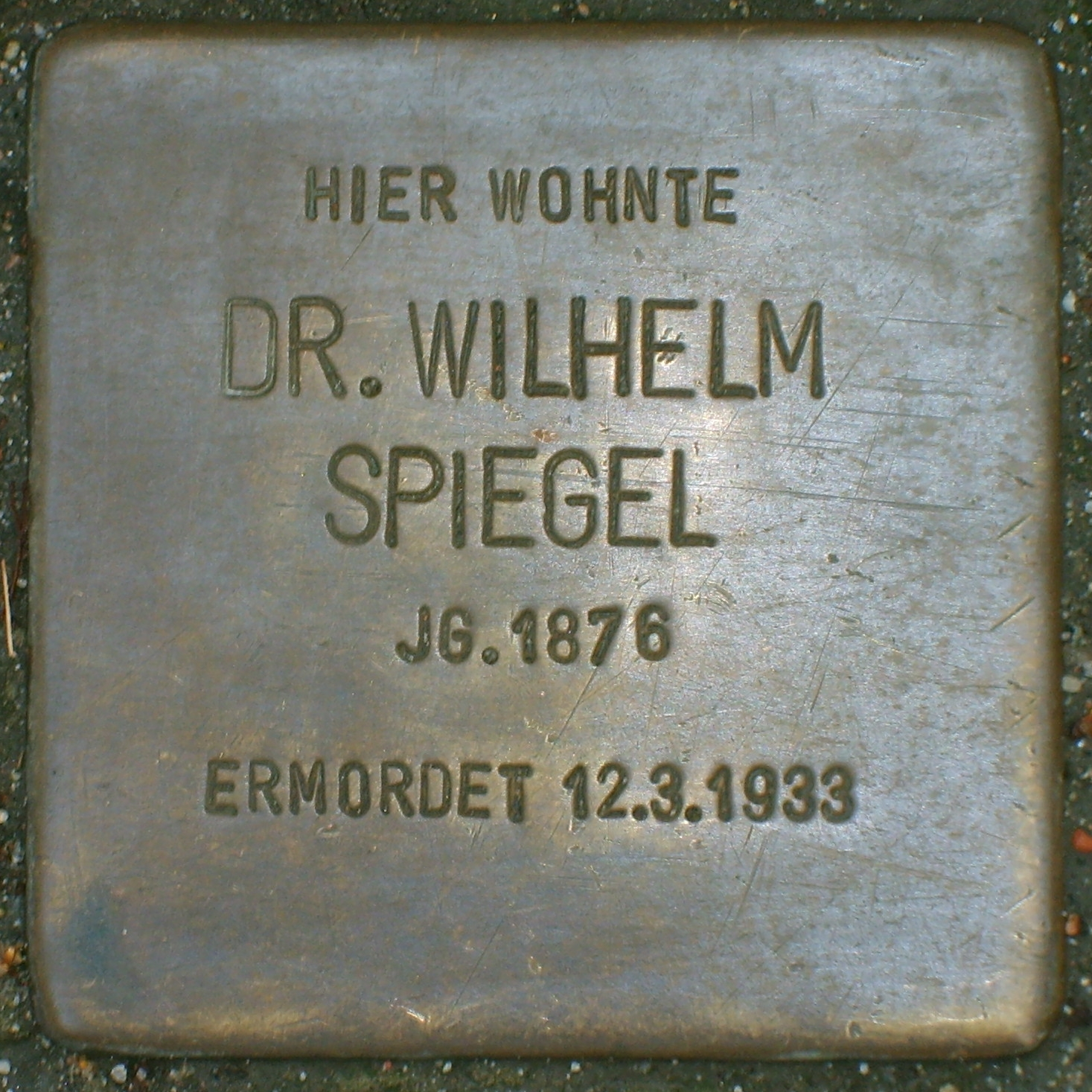 Stolperstein vor dem ehemaligen Wohnhaus Wilhelm Spiegels Anmerkung: Das Foto zeigt einen Stolperstein, der im Juni 2017 mit einem neuem ausgetauscht worden, weil die angegebene Doktortitel nicht zutrifft.